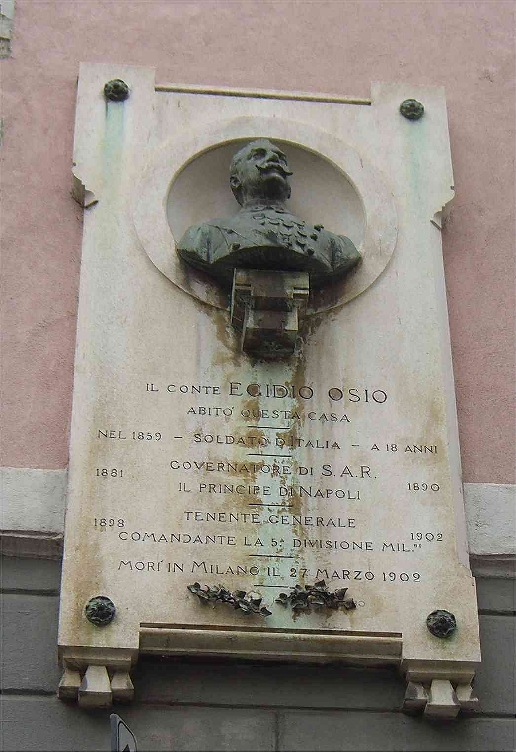 Monza lapide commemorativa del conte Egidio Osio (Milano, 1840 - Milano, 1902) posta in via Giuseppe Piermarini